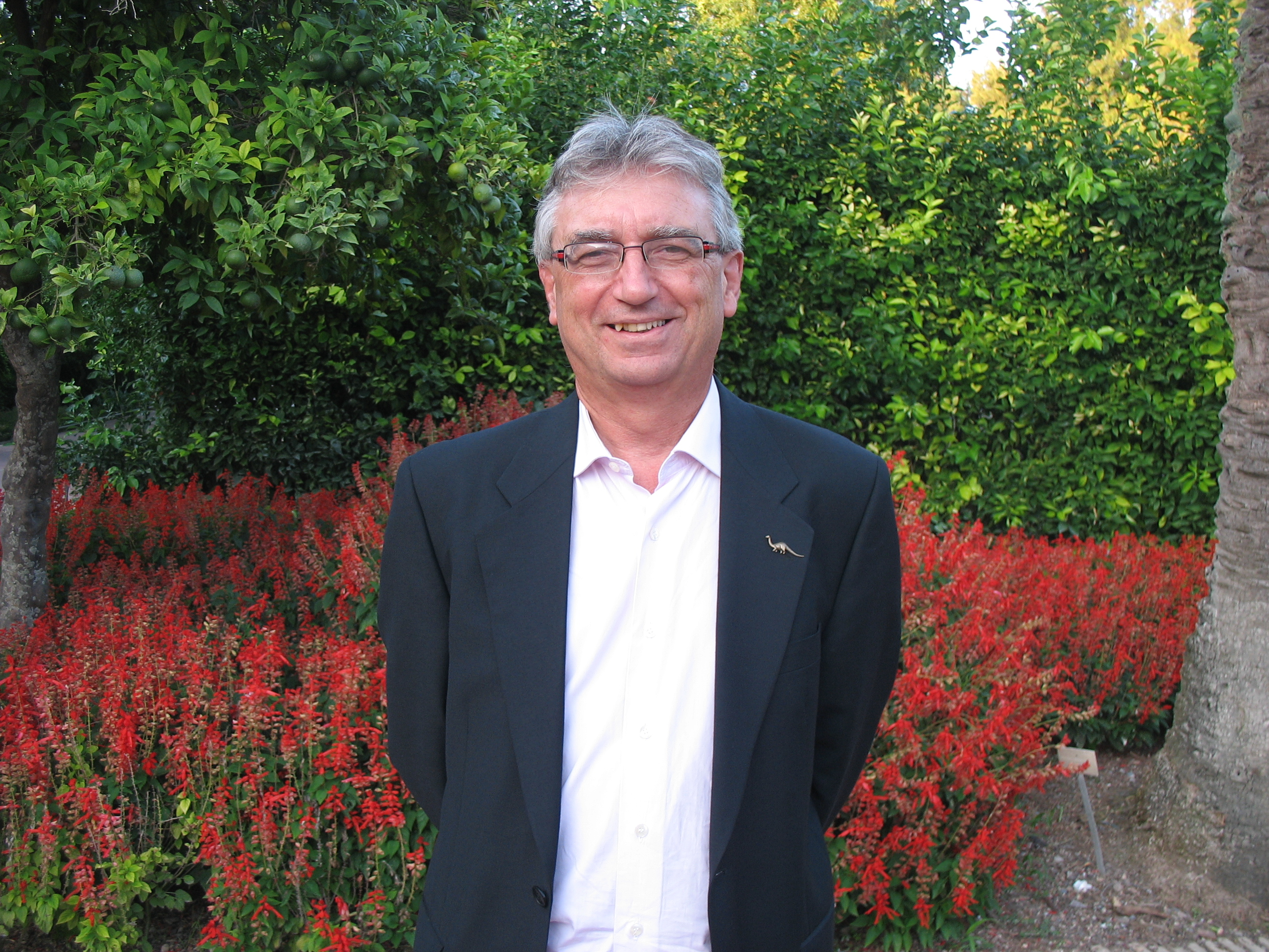 Luis Alcalá Martínez, paleontólogo español. Director gerente de la Fundación Conjunto Paleontológico de Teruel-Dinópolis.